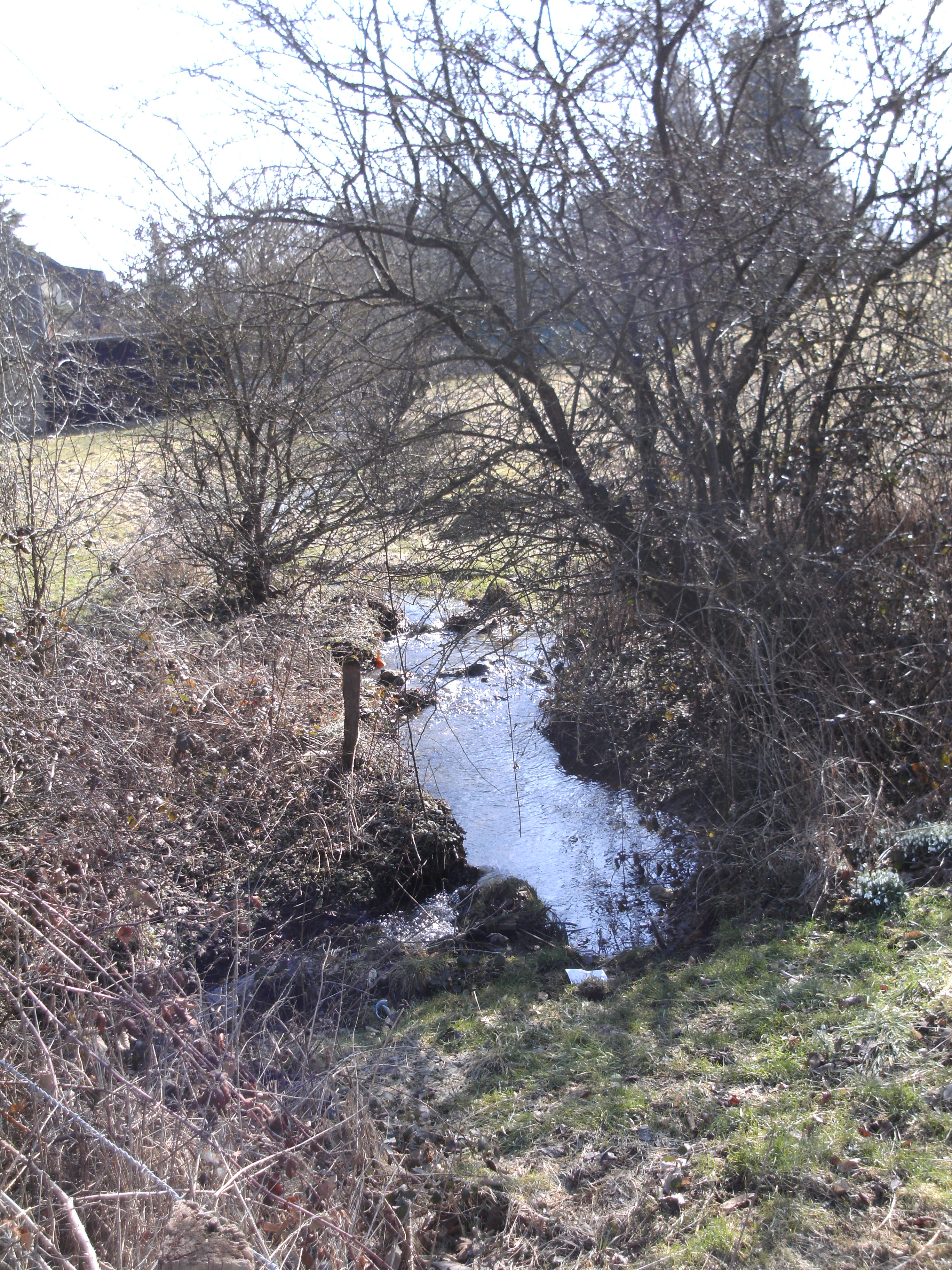 Flachsbach in Büsbach